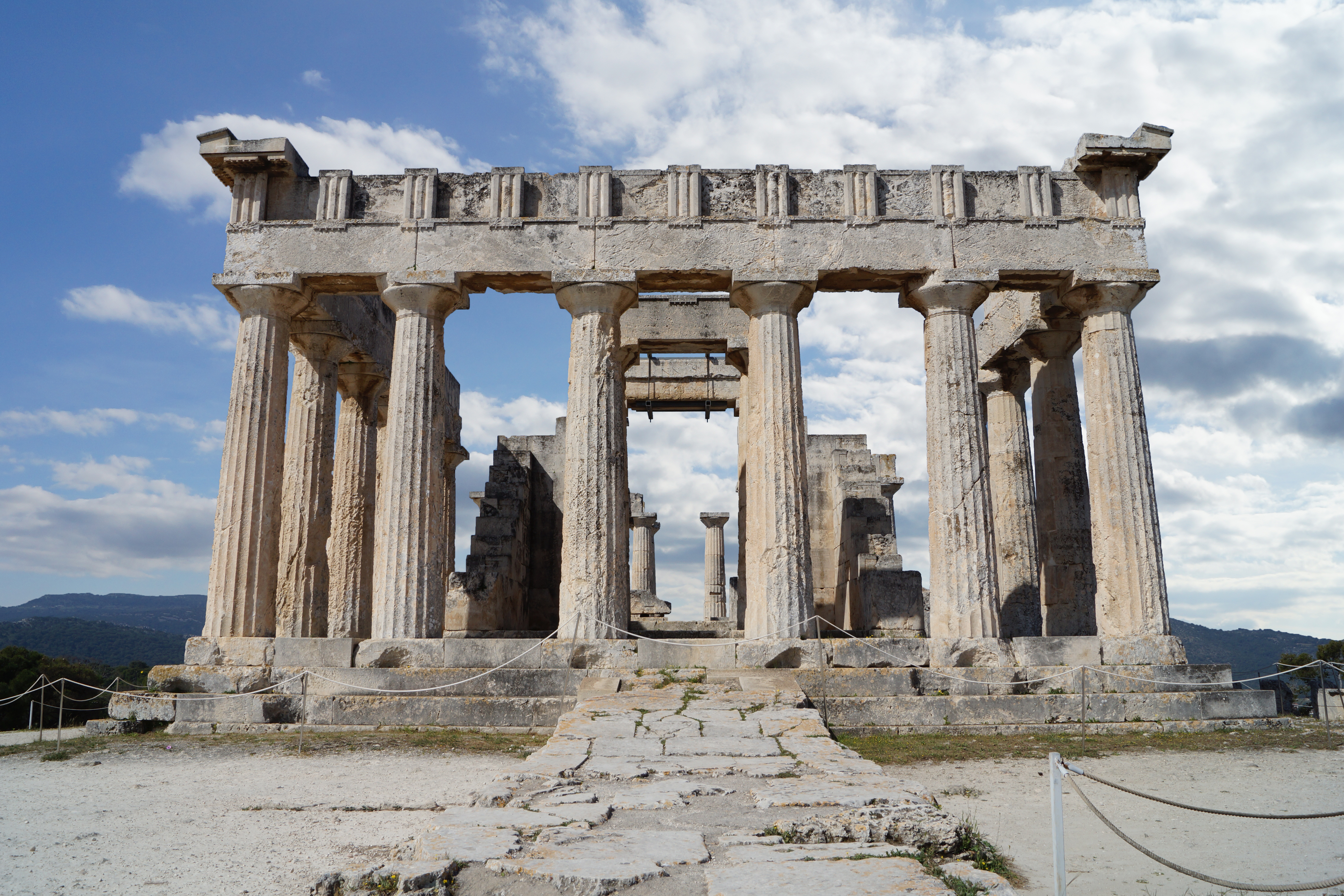 Η πρόοψη του ναού της Αφαίας Αθηνάς στην Αίγινα. Κτισμένος περίπου το 500-490 π.Χ. Είναι Αρχαϊκός και πιθανόν να αποτέλεσε πρότυπο για τους αρχιτέκτονες του Παρθενώνα στην Αθήνα.